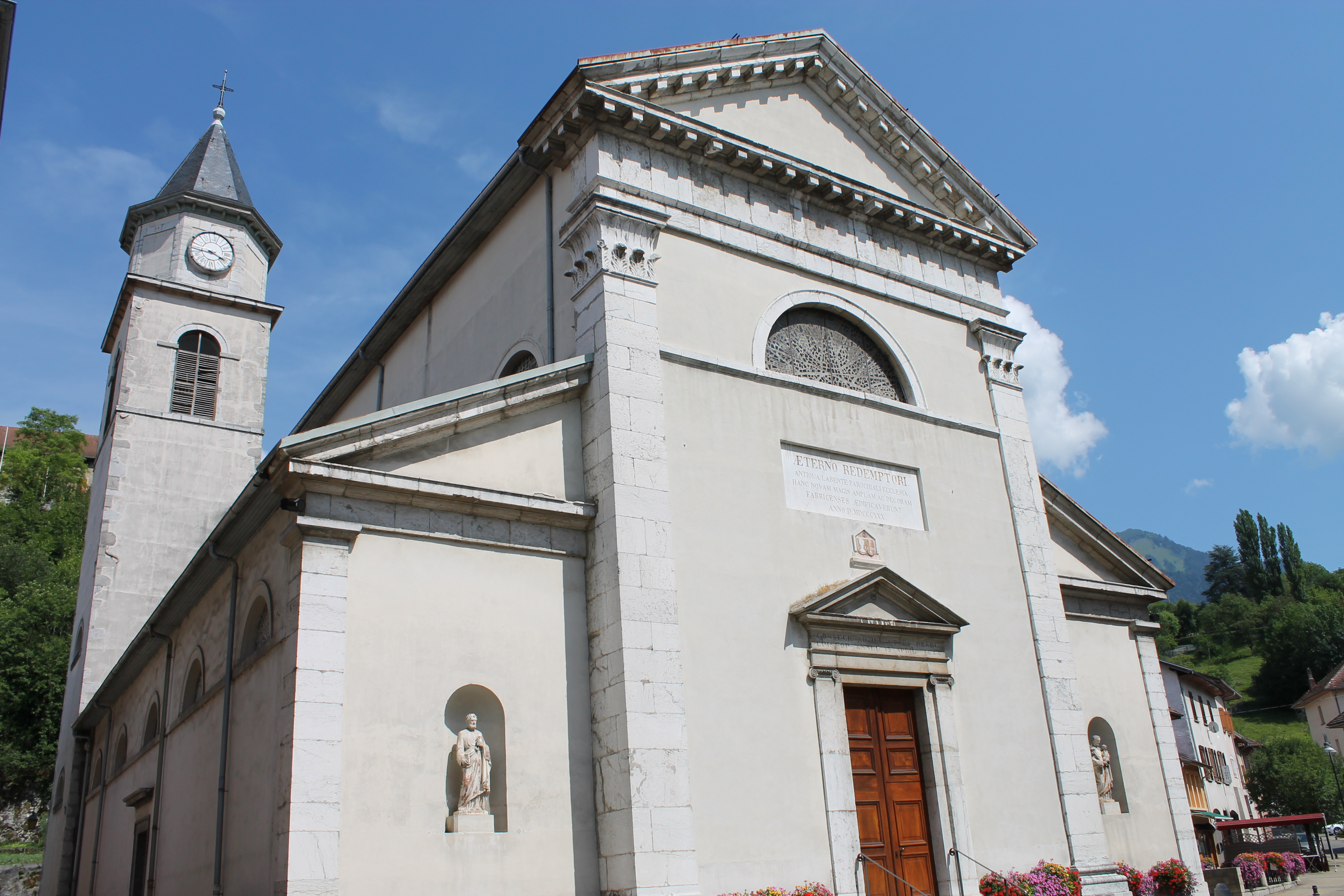 Église Saint-Pierre de Faverges (XIXe siècle)